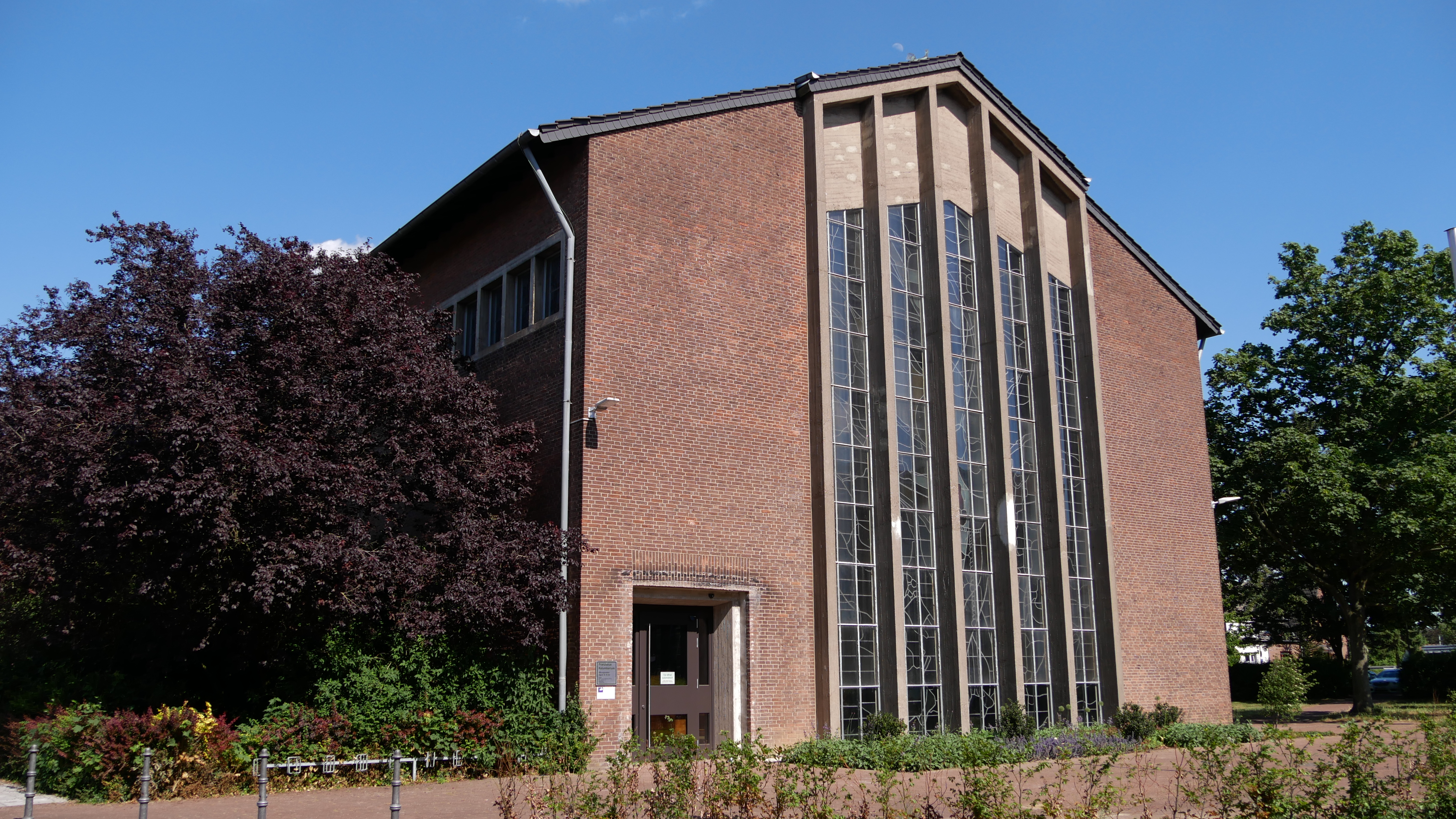 Ehemalige St Franziskus-Kirche, Wesel. Seit März 2020 als Kolumbarium genutzt